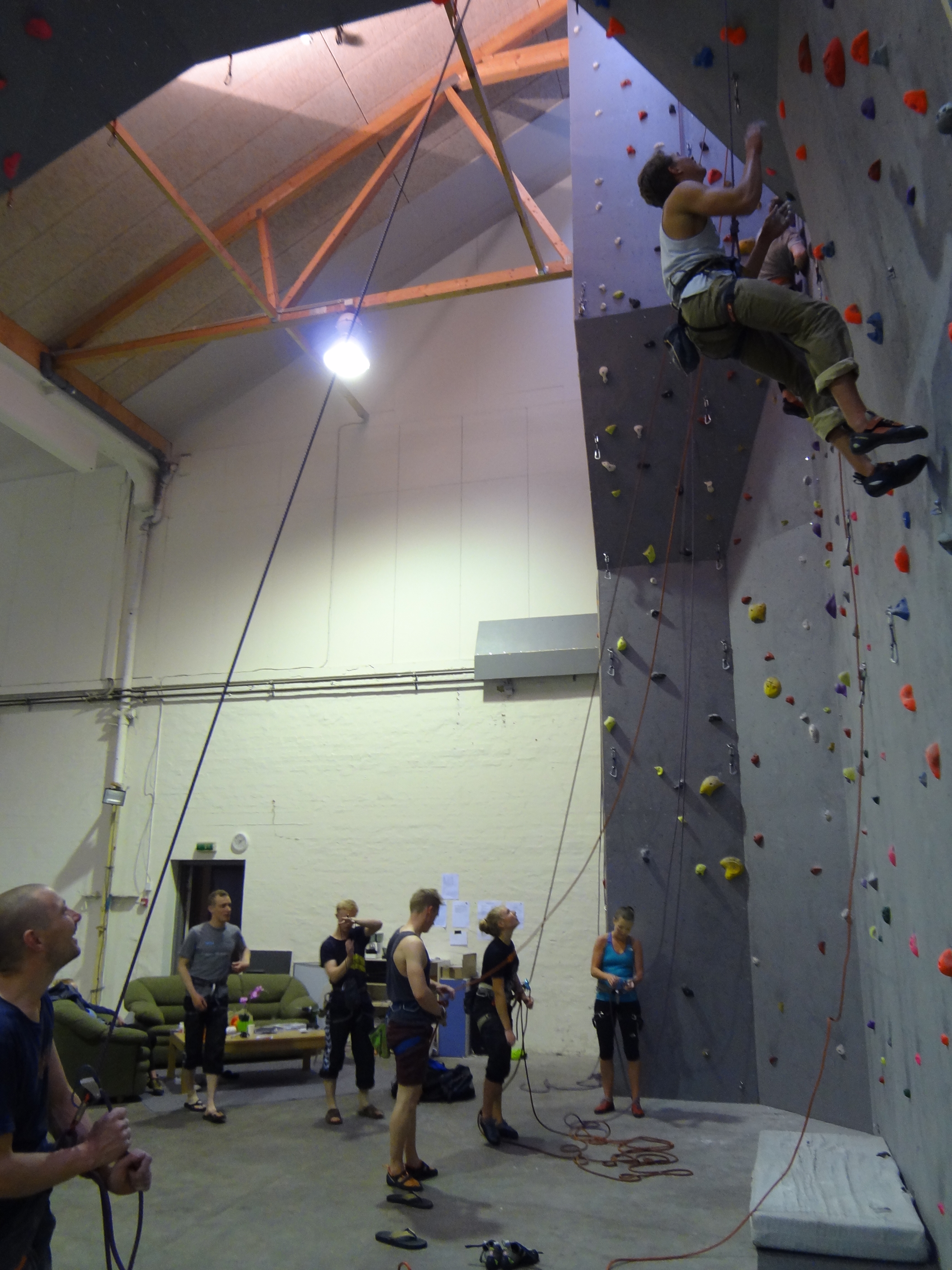 Klatrevæg i Kolding Klatreklub i Volkerts Fabrikker i Kolding